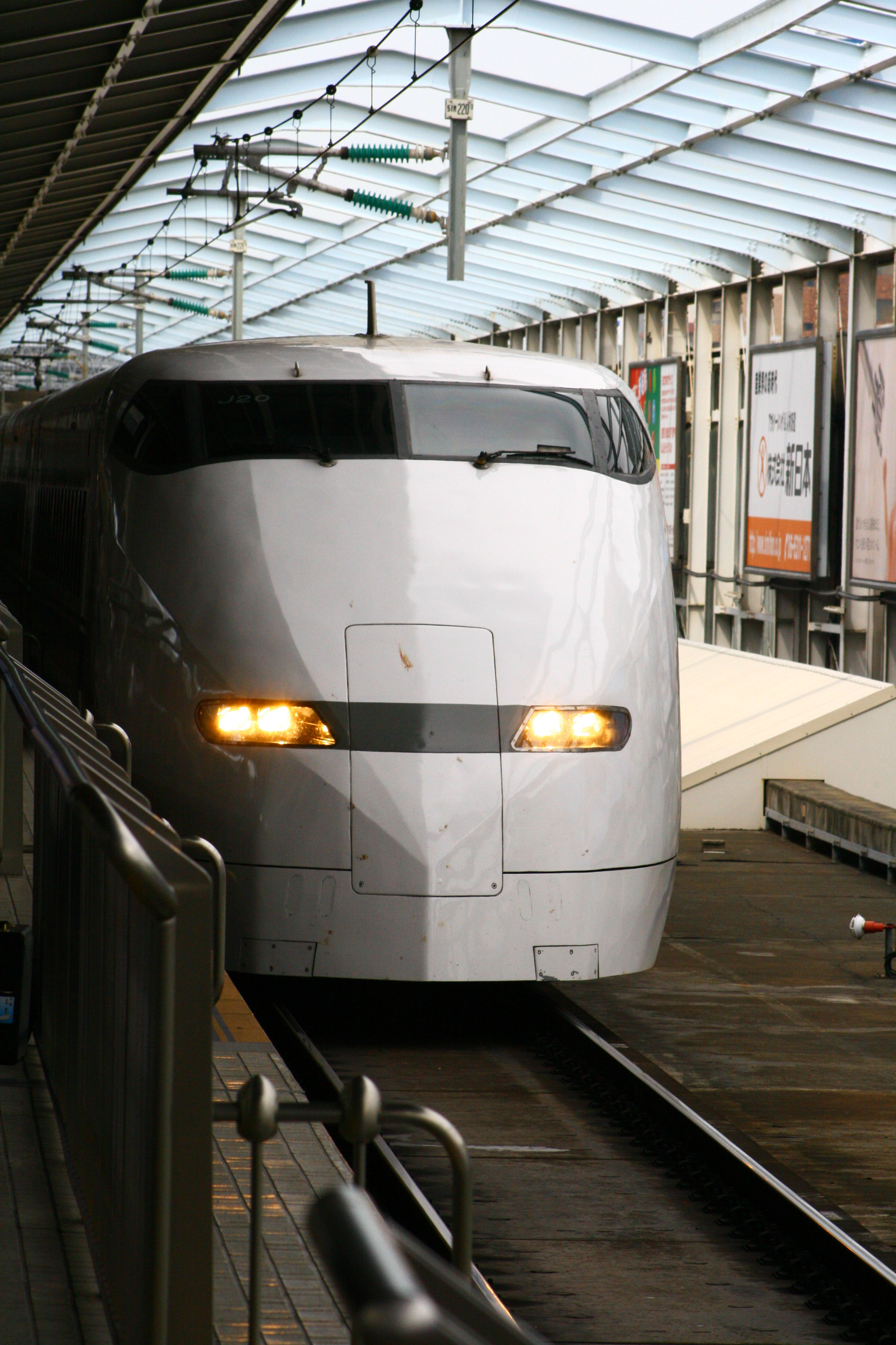 作光速號之用的300系列車